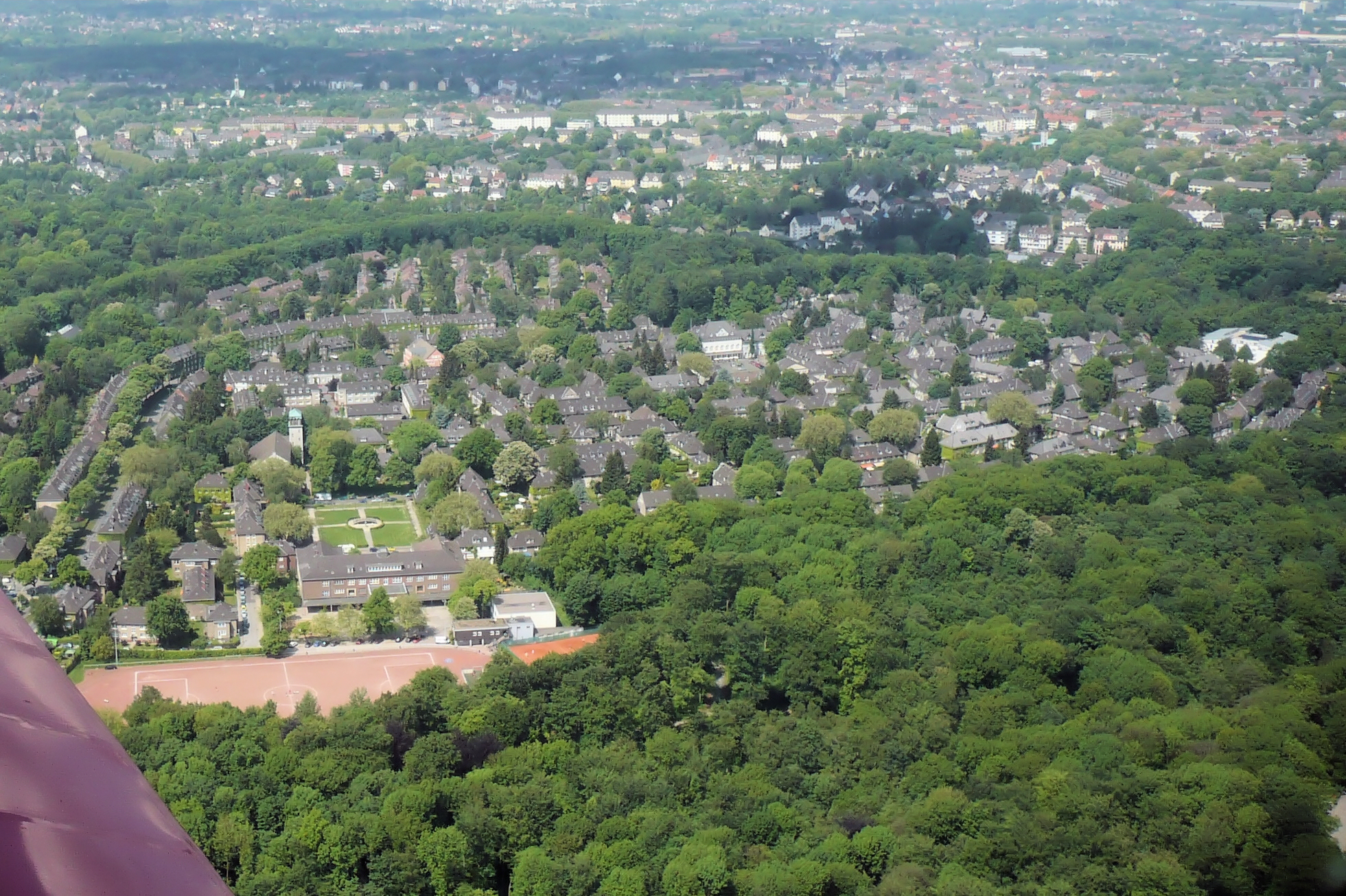 Essen-Margarethenhöhe, Luftaufnahme von Südosten